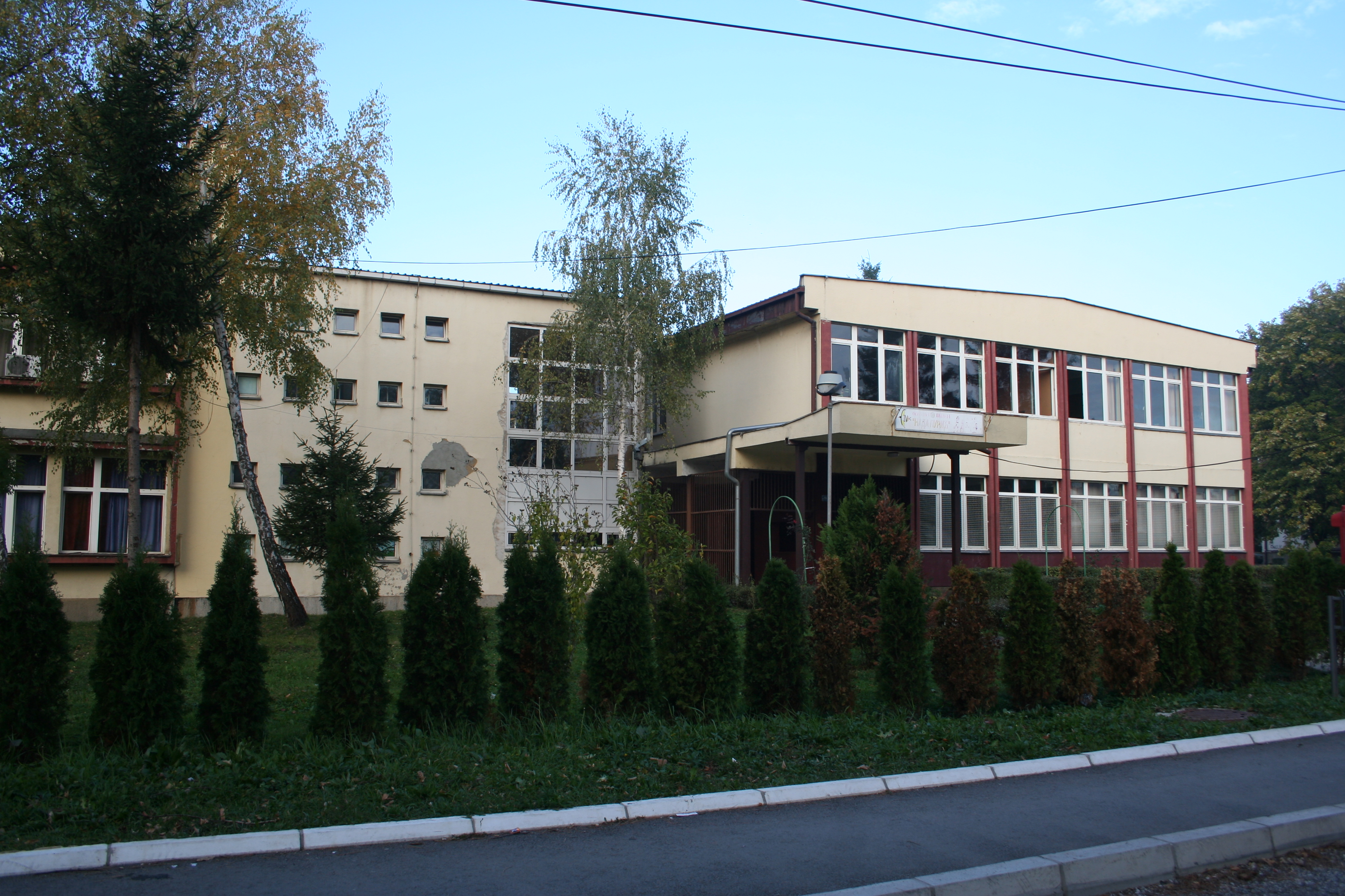 OŠ Nada Purić Valjevo